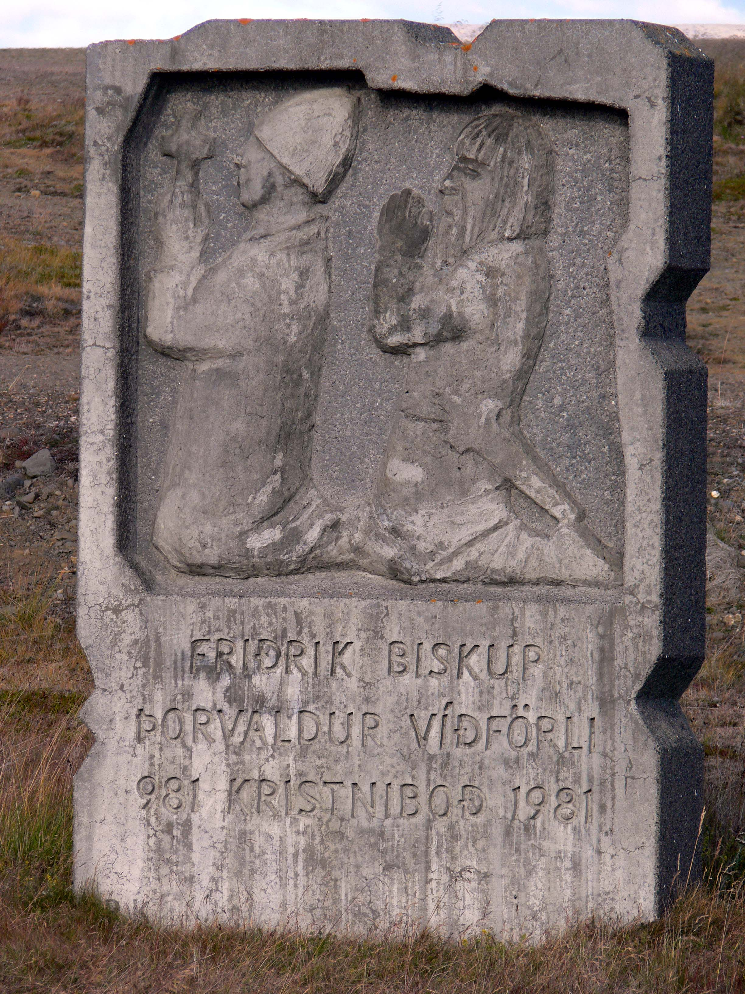 Denkmal für den ersten Missionsbischof Fridrik und seinen Begleiter Þorvaldur Víðförli, die am Vatnsdalsfjall in Nordisland 981 ihre Missionstätigkeit begannen und 15 Jahre lang betrieben.